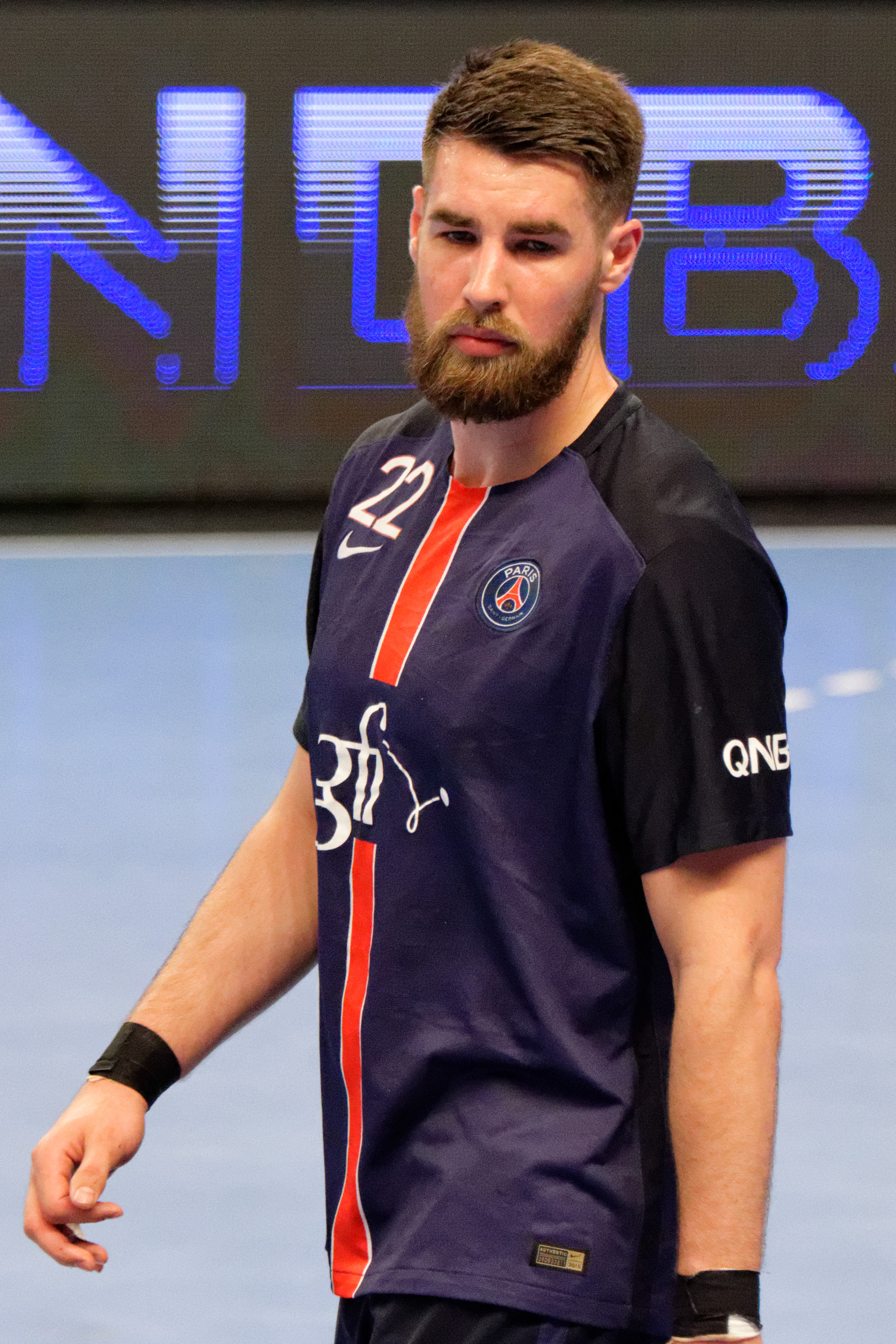 PSG Handball / Toulouse Fenix Handball lors de la 21e journée du championnat de France de handball masculin le 16 avril 2016 au stade Pierre de Coubertin à Paris.